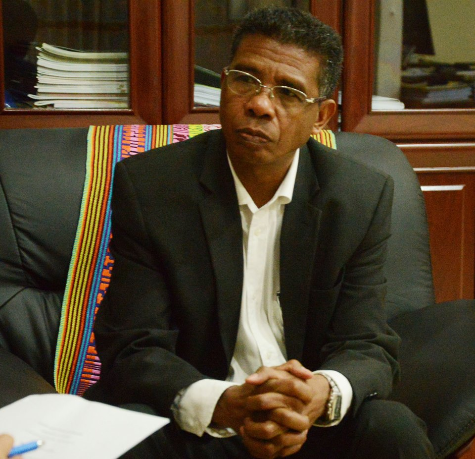 António da Conceição, Bildungsminister Osttimors